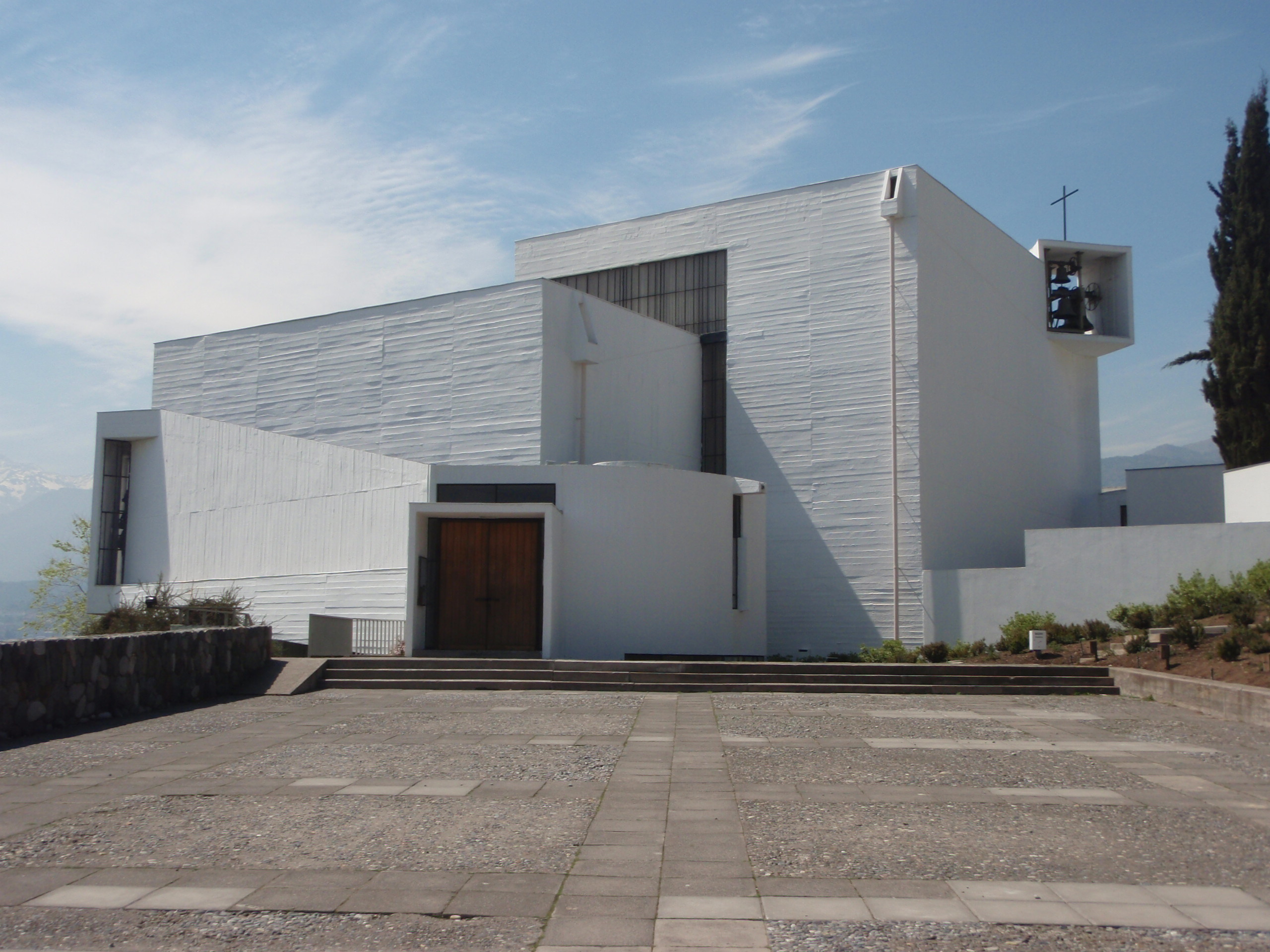 Monasterio Benedictino This is a photo of a national monument in Chile: 240